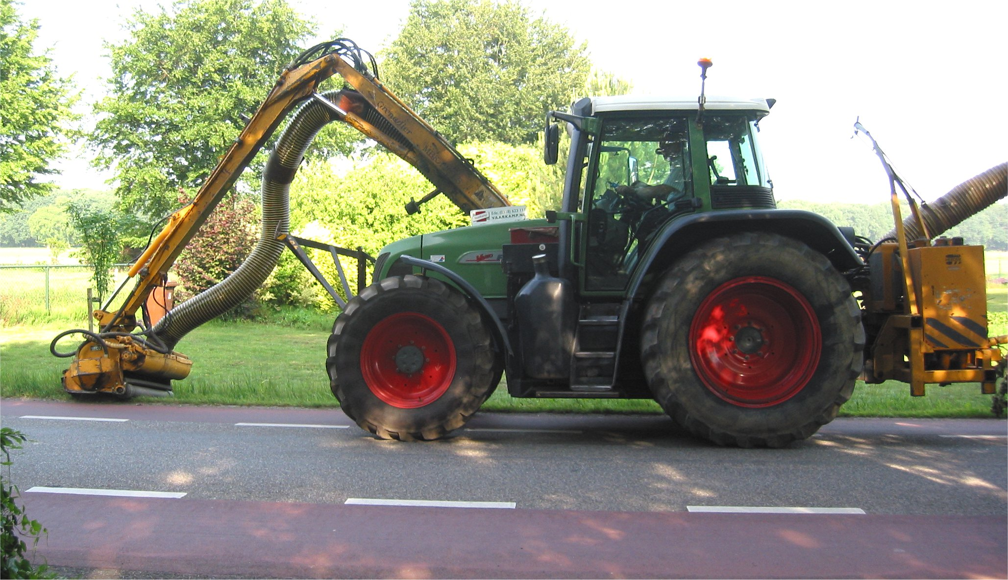 Een Fendt Favorit xxx Vario (?) tractor met een maaiarm eraan voor het maaien van een berm – Bermmaaier Herder Grenadier A120S met afzuiging